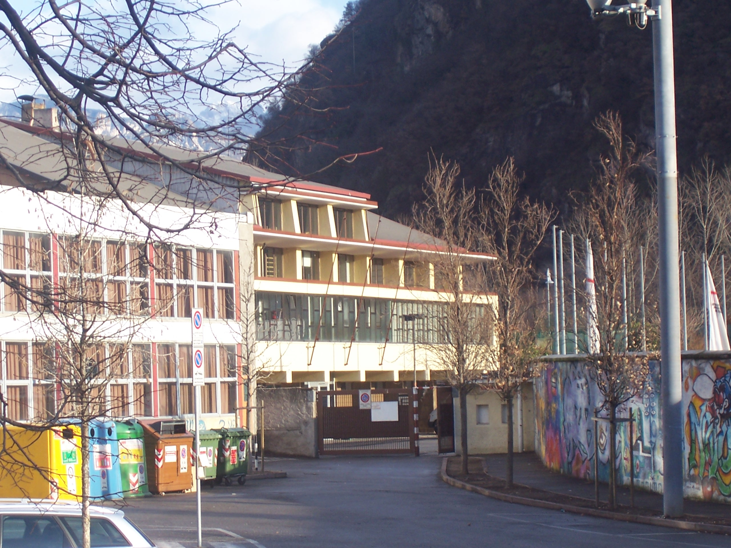 PalaMazzali, Bolzano